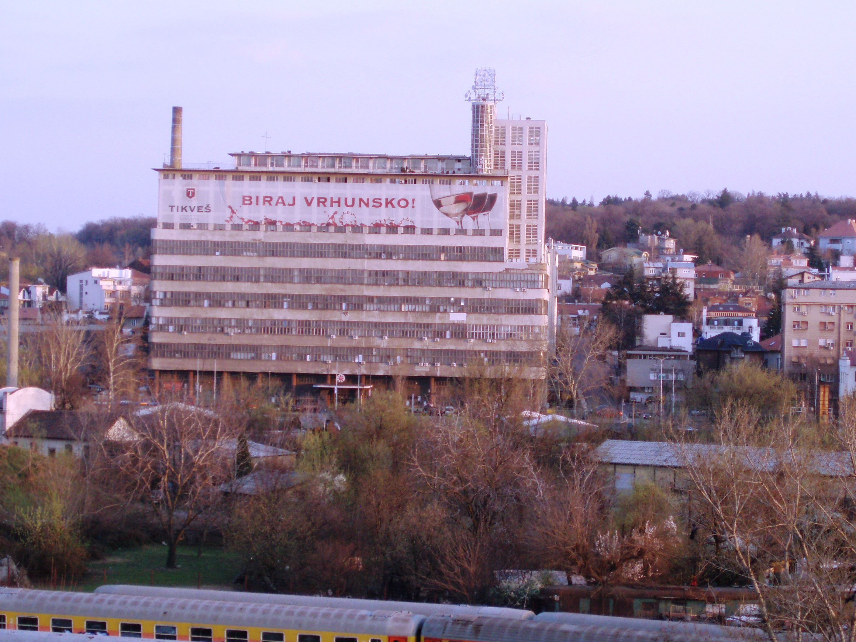 Фотографија зграде Државне штампарије архитекте Драгише Брашована саграђене 1934-1941. Аутор фотографије: Nicolo